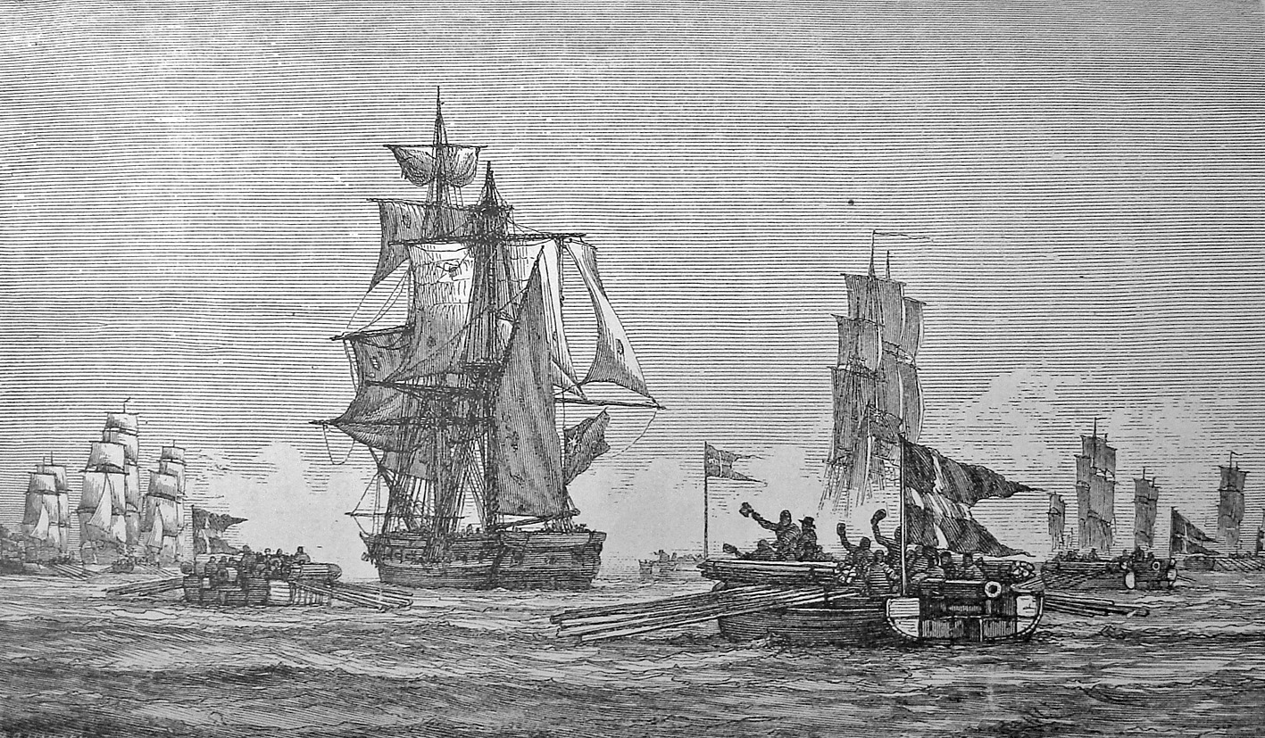 Briggen Turbulent tages af danske kanonbåde den 9. juni 1808